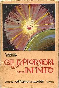 Copertina del romanzo Gli esploratori dell'infinito di Yambo, illustrazione dell'autore, Vallardi, Milano, 1930.